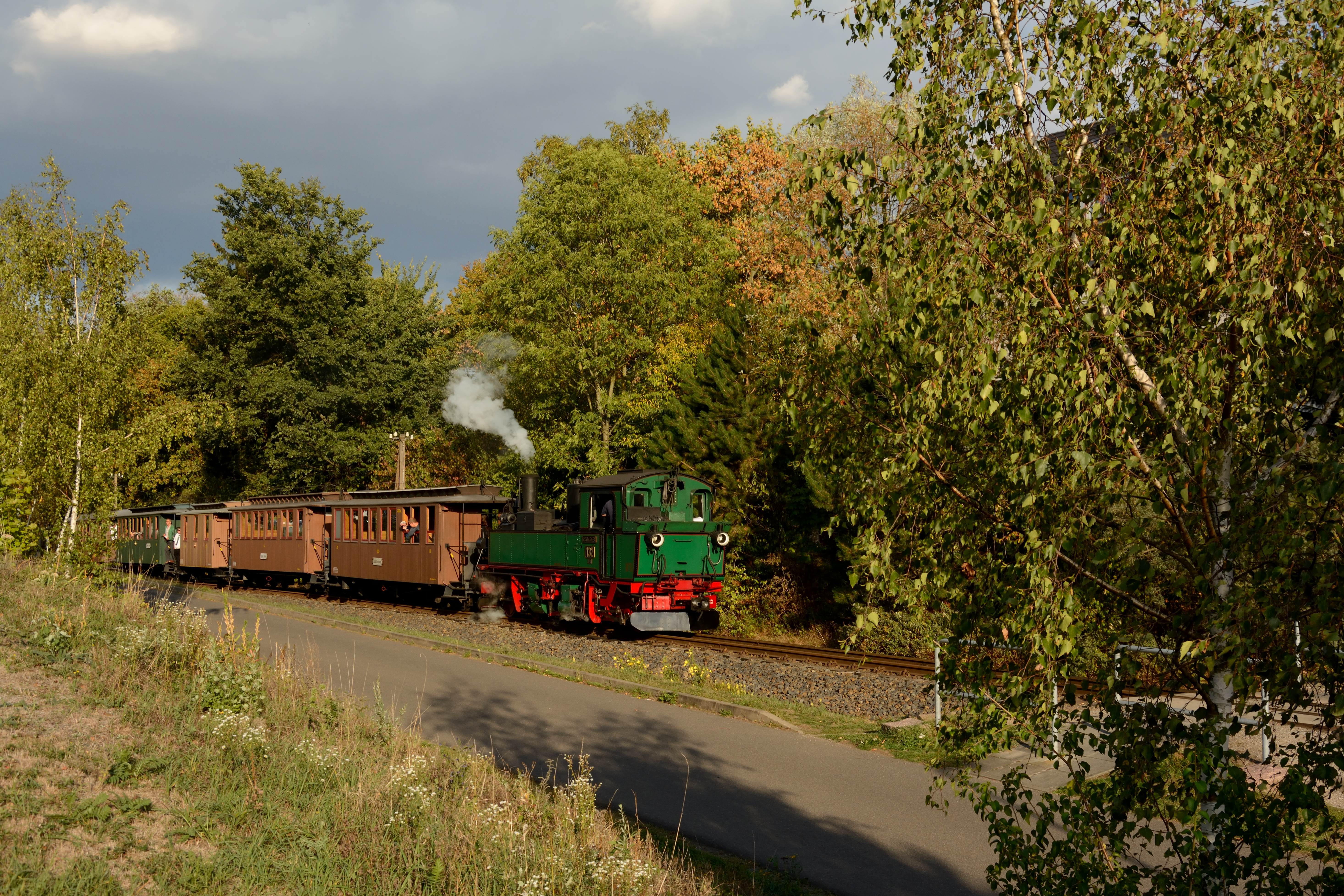 Ein Zug der Traditionsbahn Radebeul, bestehend aus originalgetreu restaurierten Fahrzeugen, verkehrt anlässlich einer Sonderfahrt auf der Schmalspurbahn Radebeul Ost - Radeburg.